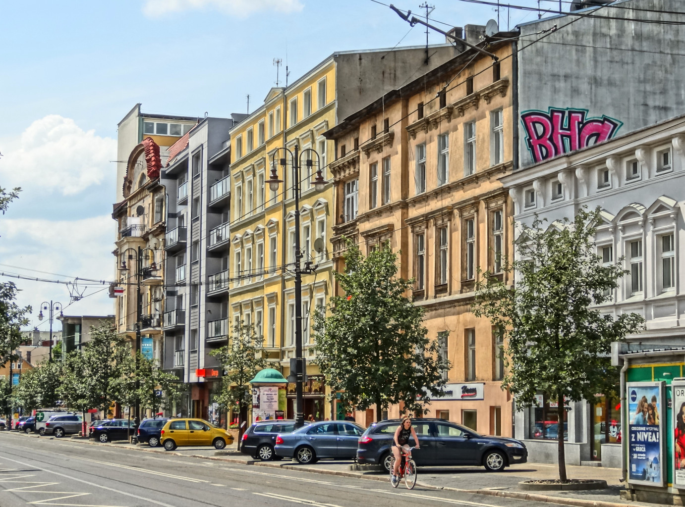 Ulica Gdańska w Bydgoszczy na odcinku między ul. Śniadeckich, a ul. Cieszkowskiego